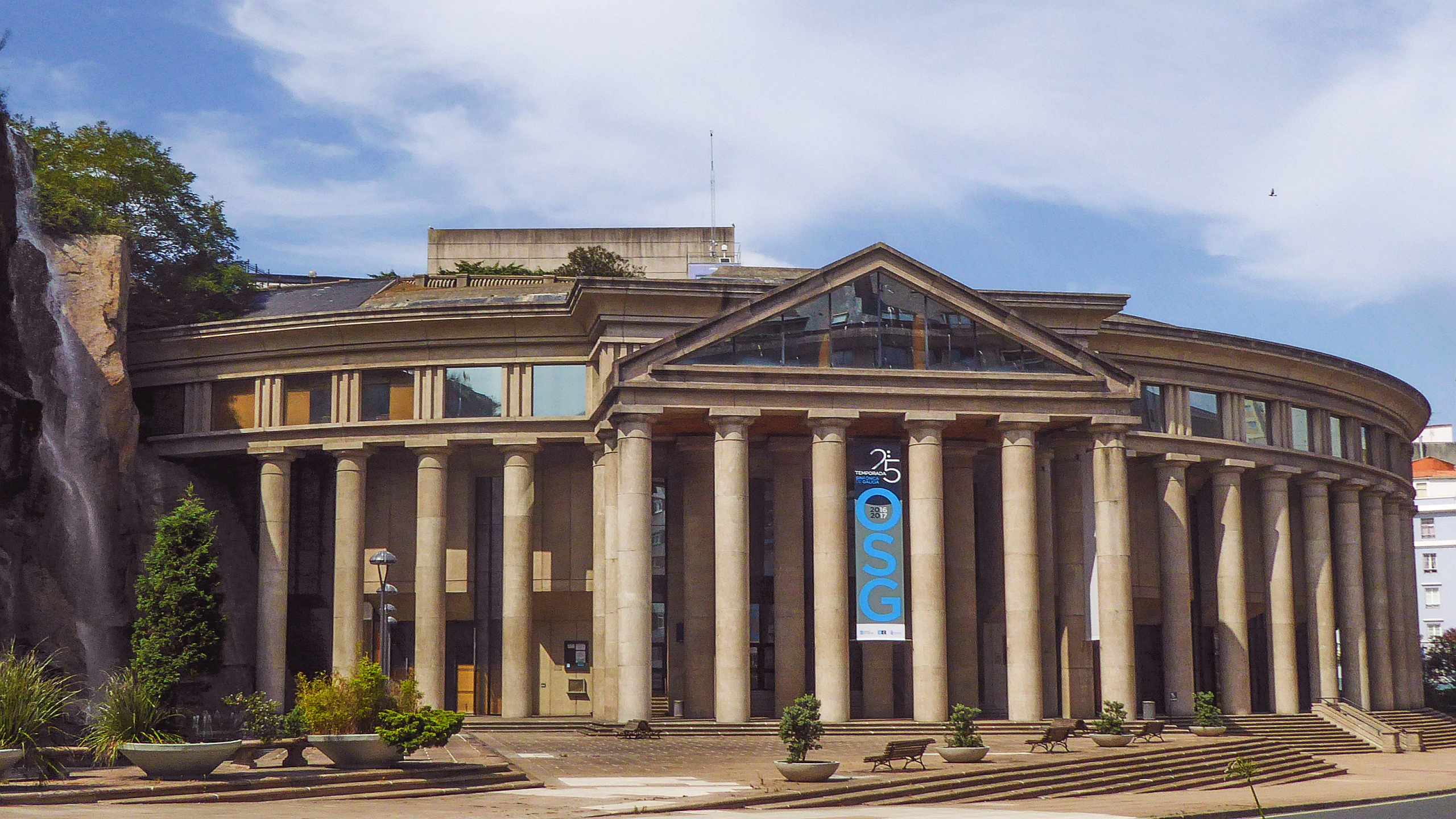 Palacio de la Ópera an der Av. de Arteixo in A Coruña - das Opernhaus von La Coruna unterhalb Casa das Ciencias - Galicien Spanien - Foto Wolfgang Pehlemann P1060315